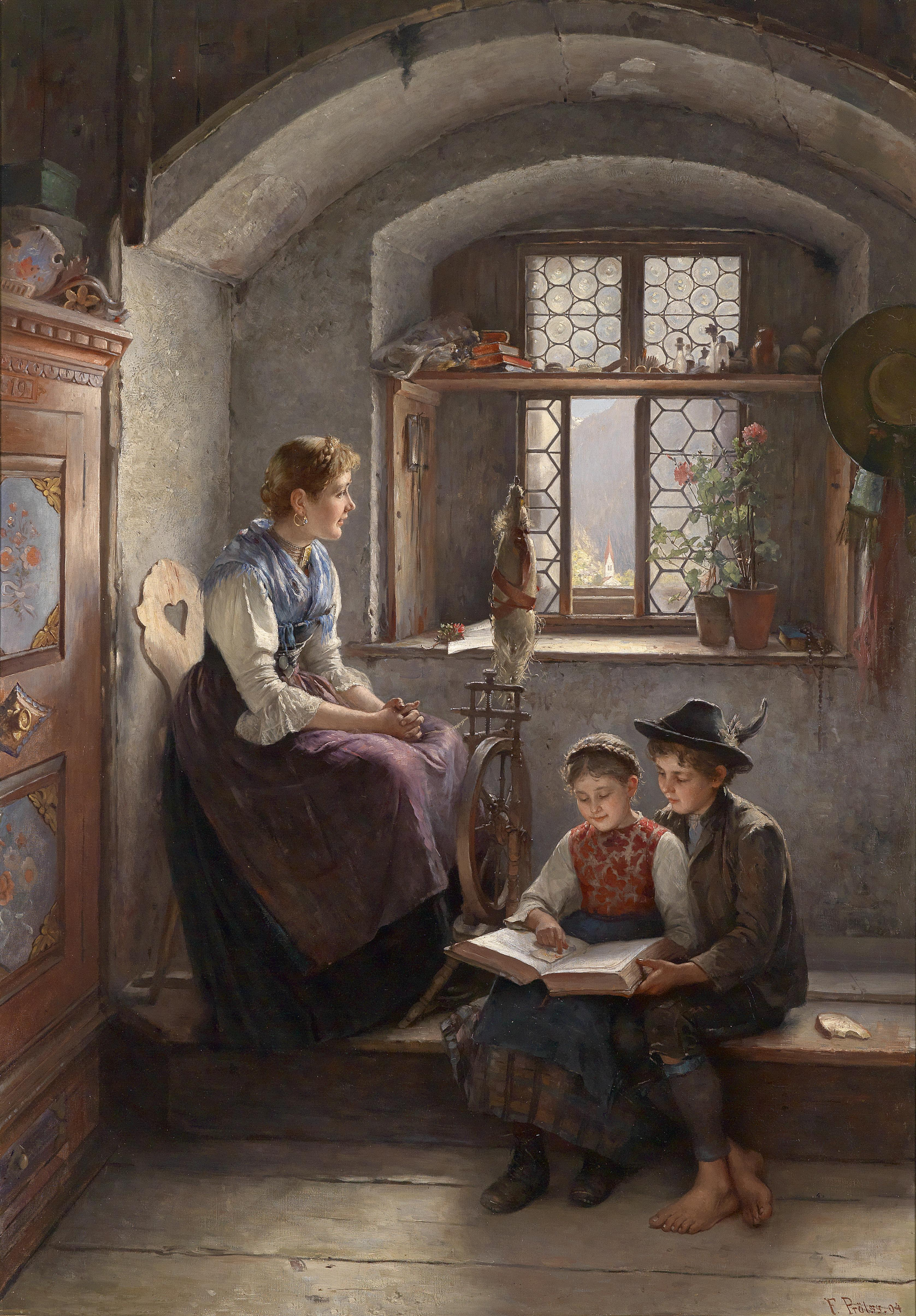 In Gedanken, signiert, datiert F. Prölss (18)94, rückseitig Etikett Große Berliner Kunstausstellung 1895 (im Ausstellungskatalog Sonntag), Öl auf Leinwand, 146,5 x 105 cm